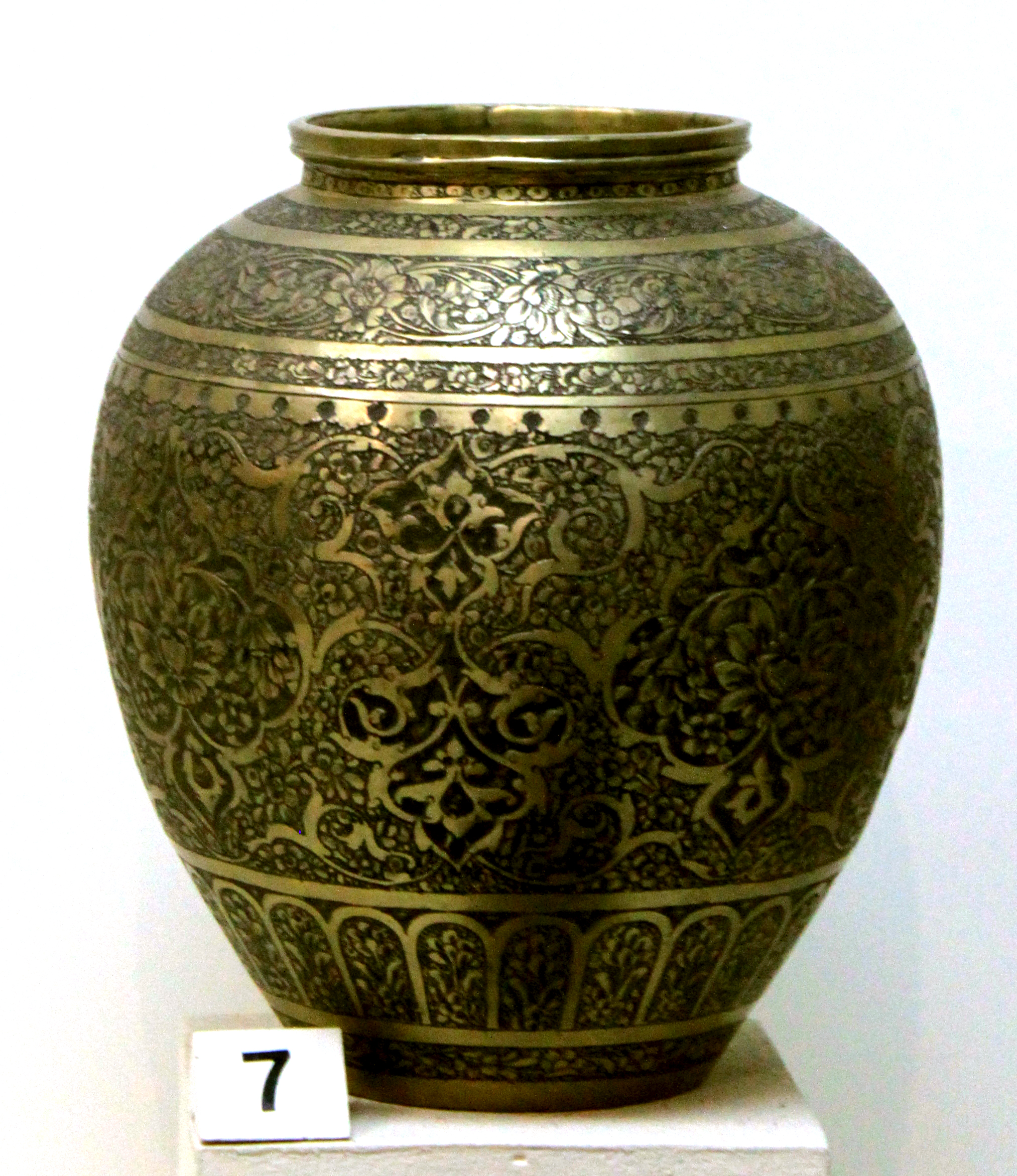 Səfəvilər dövrünə aid mis kuzə